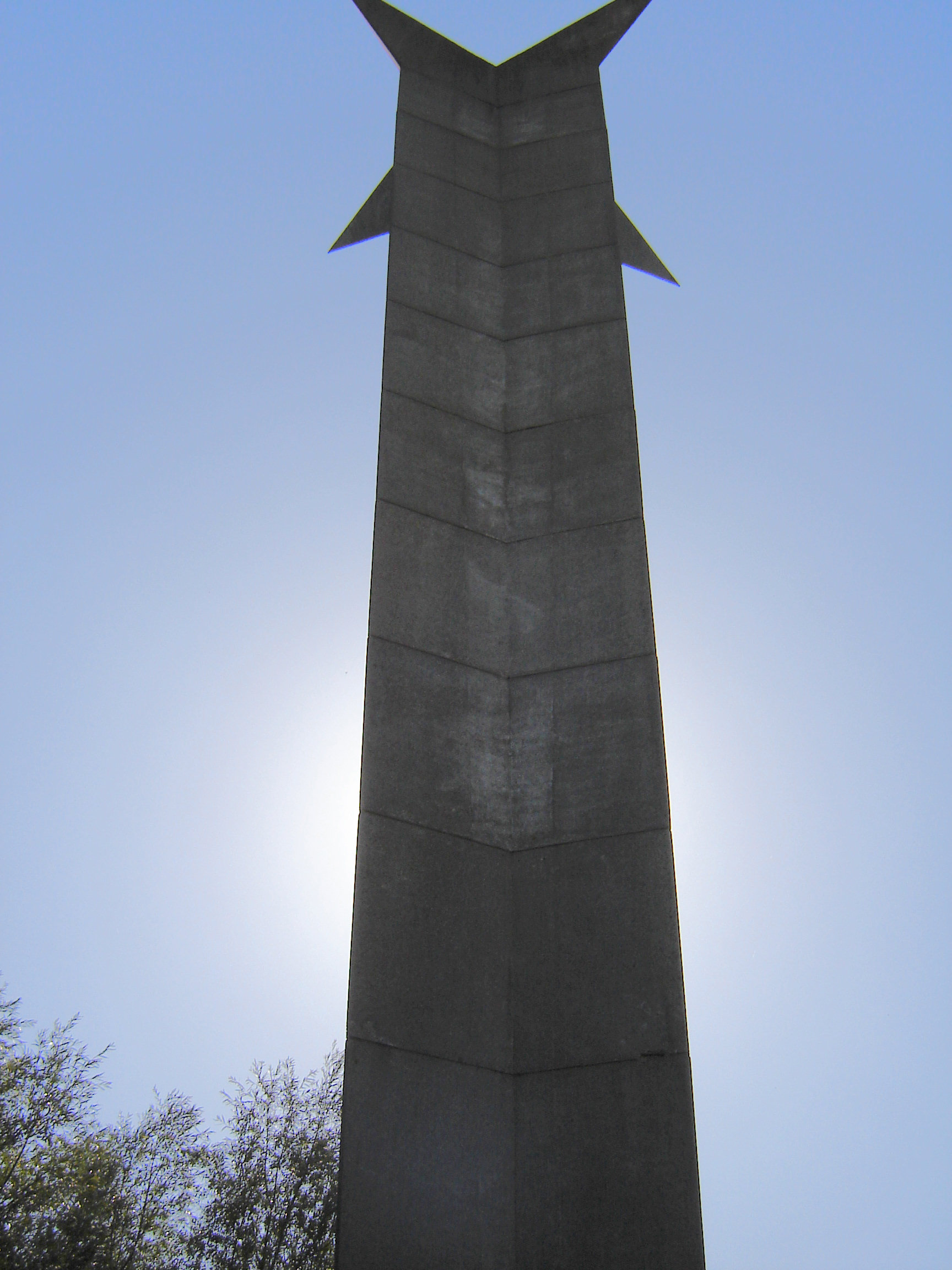 De Sjouwer, monument in Aalbeke.De Sjouwer, monument in Aalbeke. Aalbeke, Kortrijk, West Flanders, Belgium